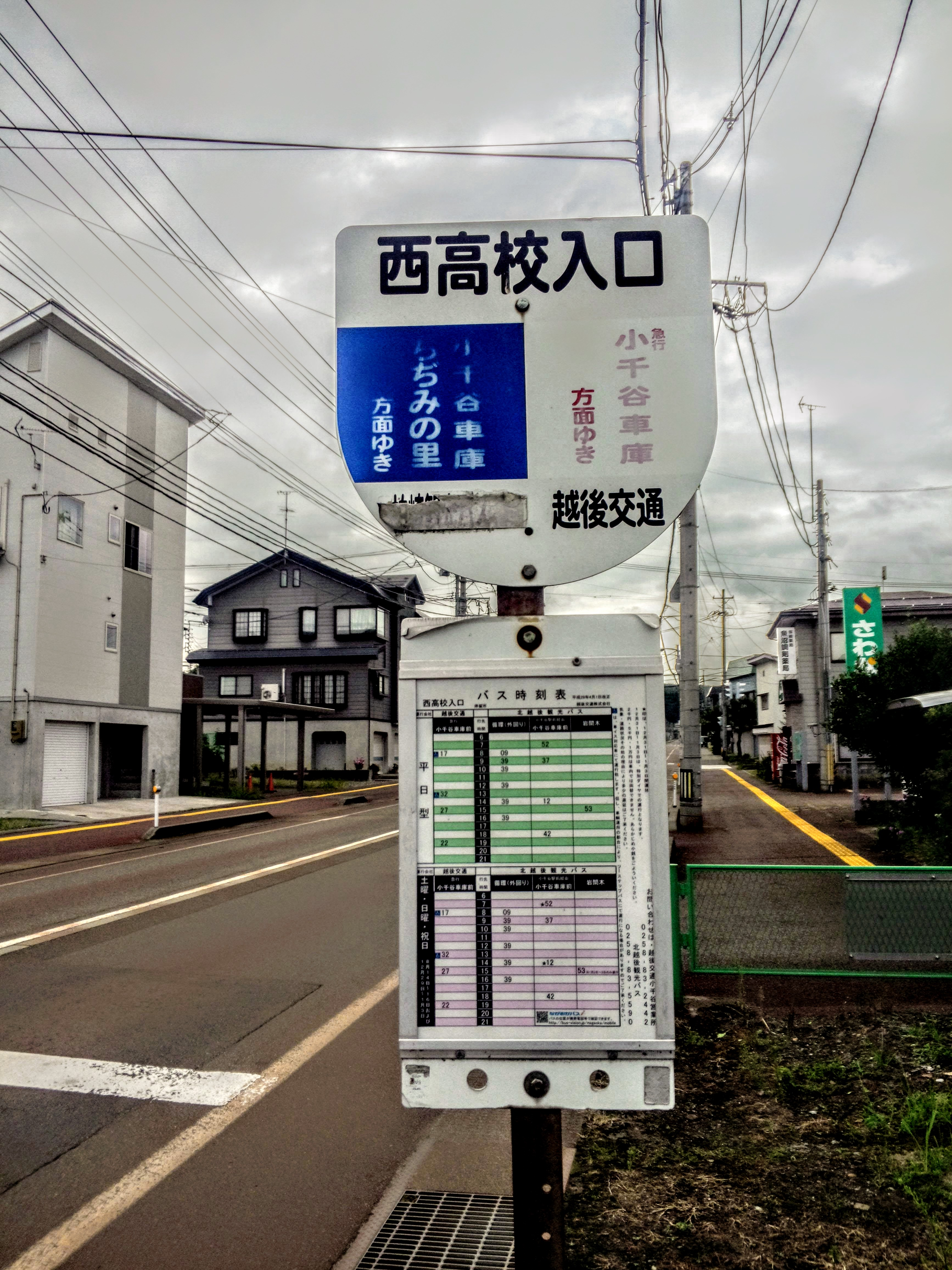 越後交通・小千谷西高校前バス停